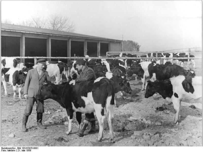 Bauern im Auslauf Zentralbild Mellahn 21.3.1959 Erhebliche Steigerung der Arbeitsproduktivität durch Groß-LPG Eine erhebliche Steigerung der Arbeitsproduktivität ist das Ergebnis des gut vorbereiteten Zusammenschlusses von vier Landwirtschaftlichen Produktiongenossenschaften im Kreis Ribnitz-Damgarten. In der Rinderhaltung wurde mit dem Zusammenschluß zu der jetzt 1200 Hektar großen LPG Schulenber die Vorraussetzung für die Aufzucht von tbc -freien Beständen geschaffen. Die Stallungen der an die Genossenschaft angeschlossenen LPG werden überwiegend für die Kälberaufzucht benutzt, so dass jetzt 75 Milchkühe sowie 211 Jungtiere und Kälber anerkannt tbc-frei sind. Diese Maßnahmen bringen den nunmehr 171 Mitgliedern der Genossenschaft einen zusätzlichen finanziellen Gewinn von 200.0000 DM. Die LPG hält gegenwärtig auf 100 Hektar landwirtschaftlicher Nutzfläche 60 Rinder und will bis zum Jahre 1965 einen Bestand von 100 Rindern, davon 50 Milchkühen erreichen. UBz: LPG-Vositzender Ernst Wulf (rechts) im Gespräch mit dem Jungviehpfleger Richard Goth im Jungviehoffenstall, in der zur Zeit 109 tbc-freie Jungtiere untergebracht sind.